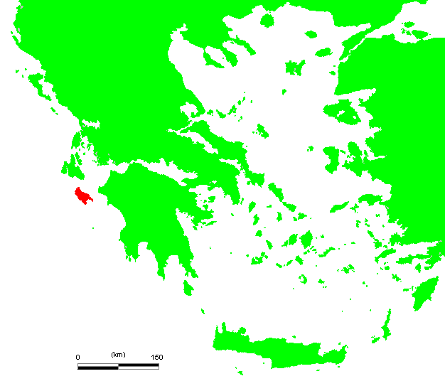 GR Zakynthos.PNG (Greek island)